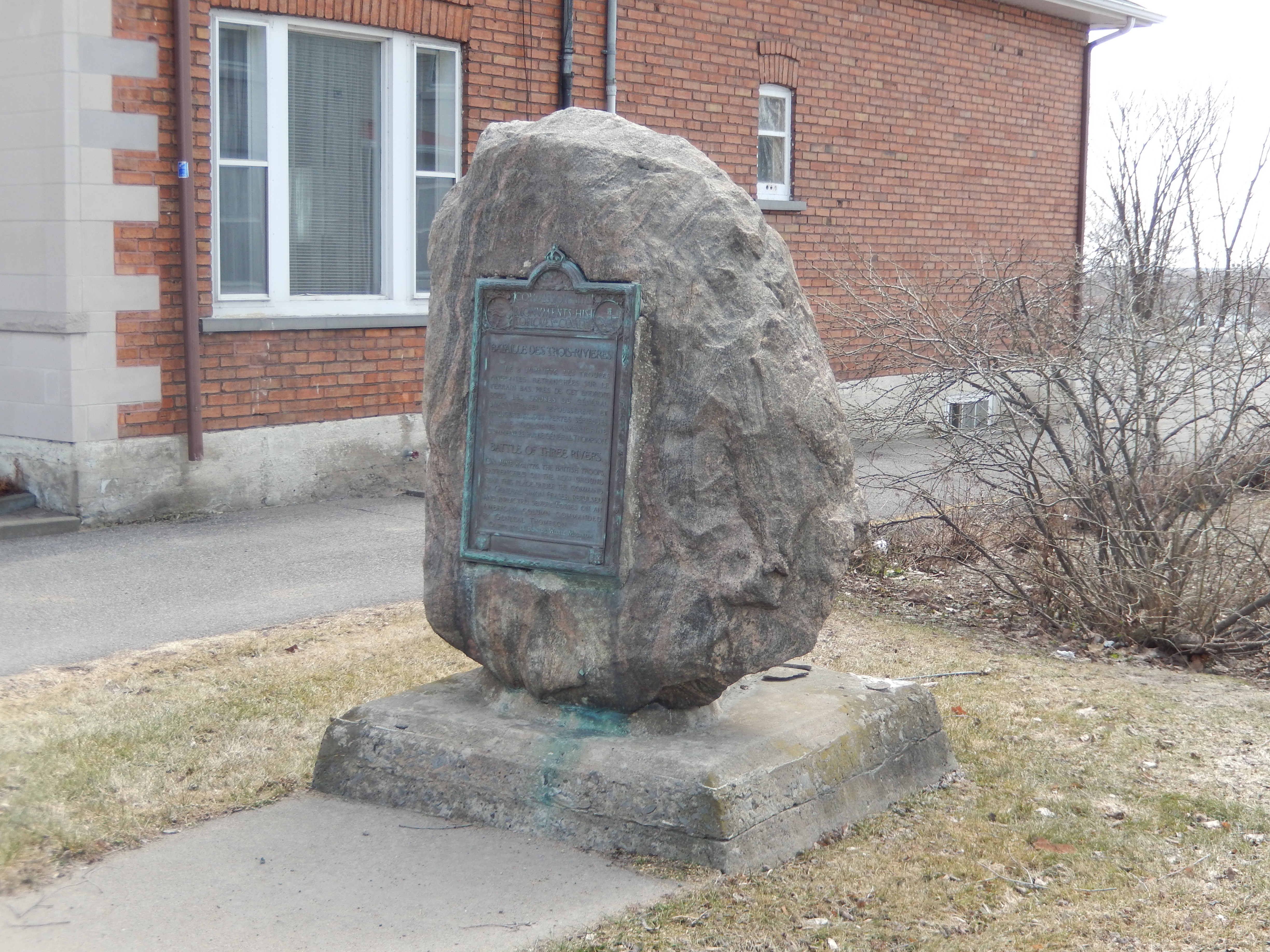 Monument de la bataille de Trois-Rivières en avril 2016